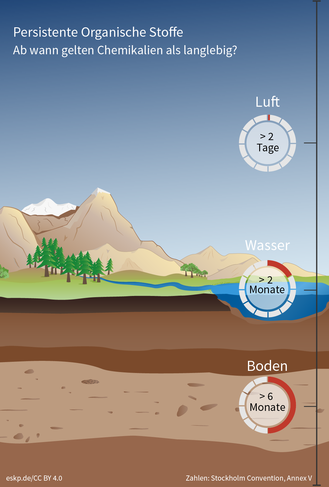 Die Infografik zeigt, ab welcher Halbwertszeit in einem Umweltkompartiment ein Schadstoff laut Stockholmer Übereinkommen als persistent (langlebig) eingestuft wird.